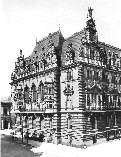 Die Bürgerschaftsseite des neuen Rathauses 1897This is a photograph of an architectural monument.